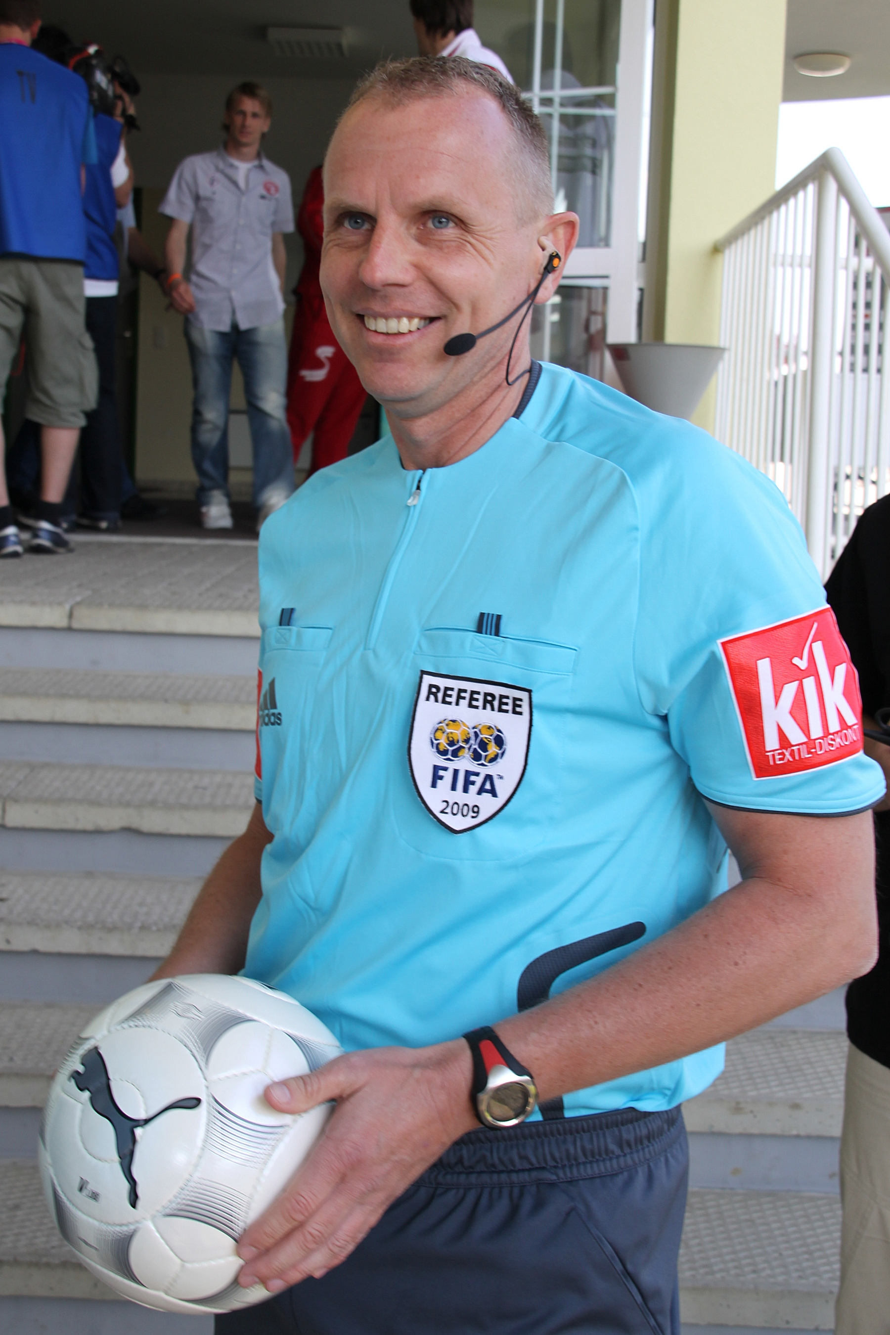 Fritz Stuchlik, österreichischer Fußballschiedsrichter im Bundesliga-Spiel SV Mattersburg gegen Kapfenberger SV (hoch)